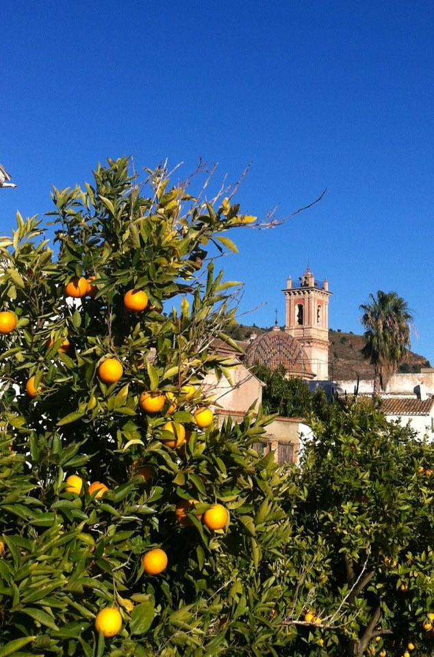 Taronger i campanar de Petrés